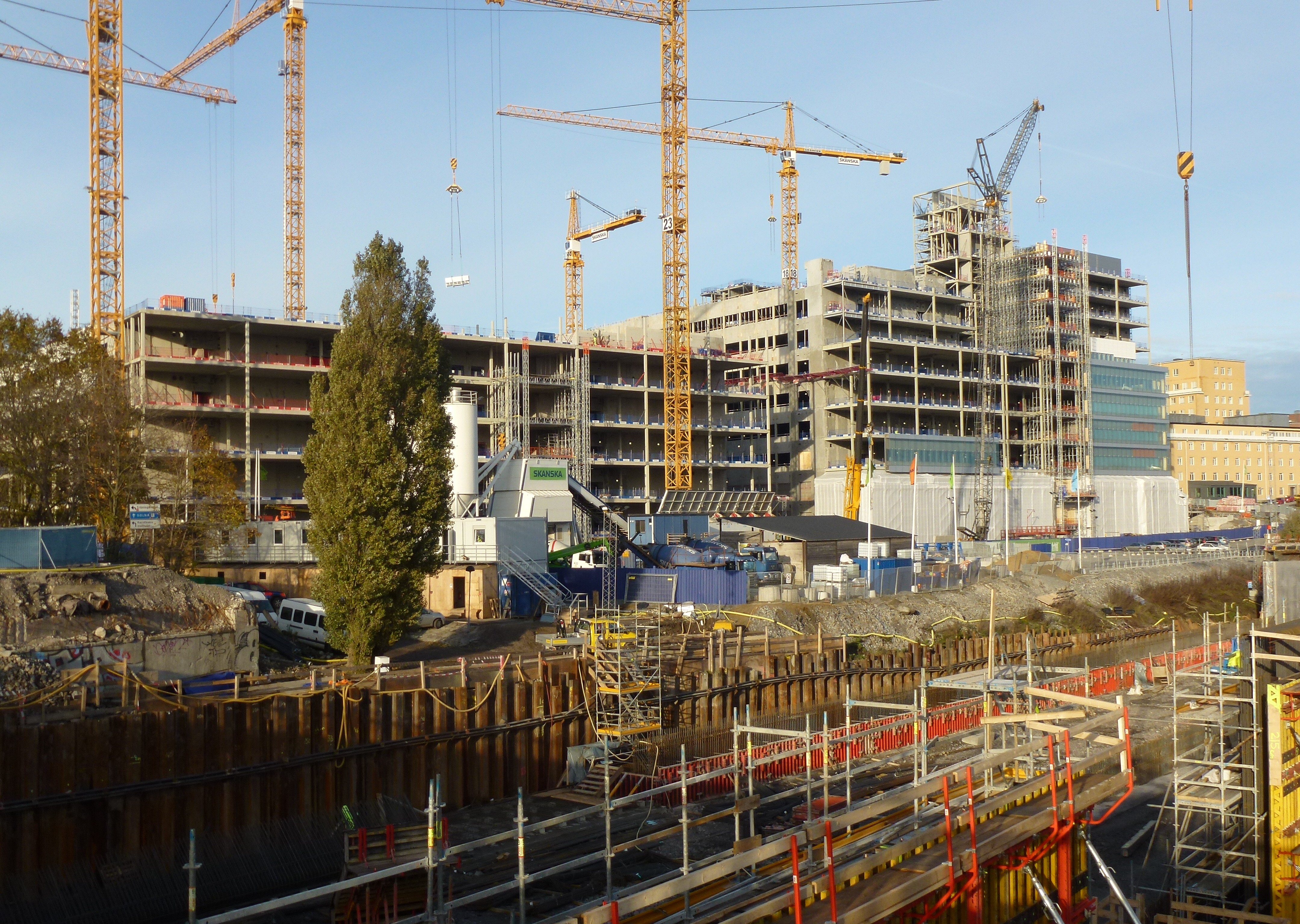 Nya Karolinska sjukhuset uppförs